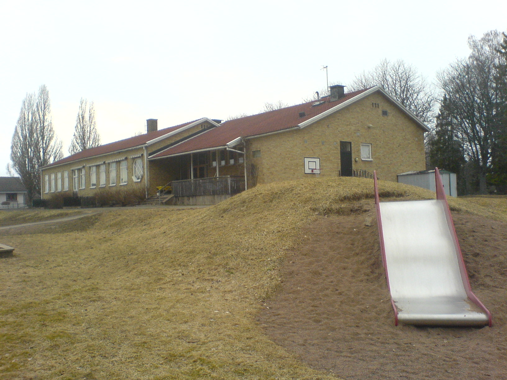 Foto:sv:Användare:Sanjay